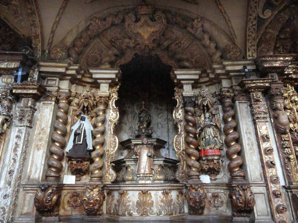 Igreja Matriz de Nossa Senhora da Conceição (Sabará)